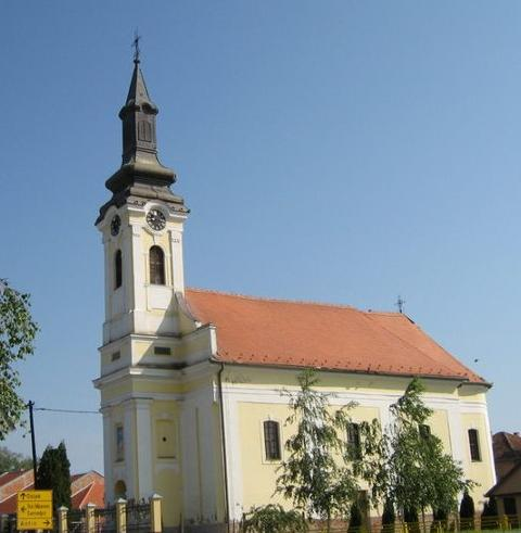 Pravoslavna crkva u Markušici